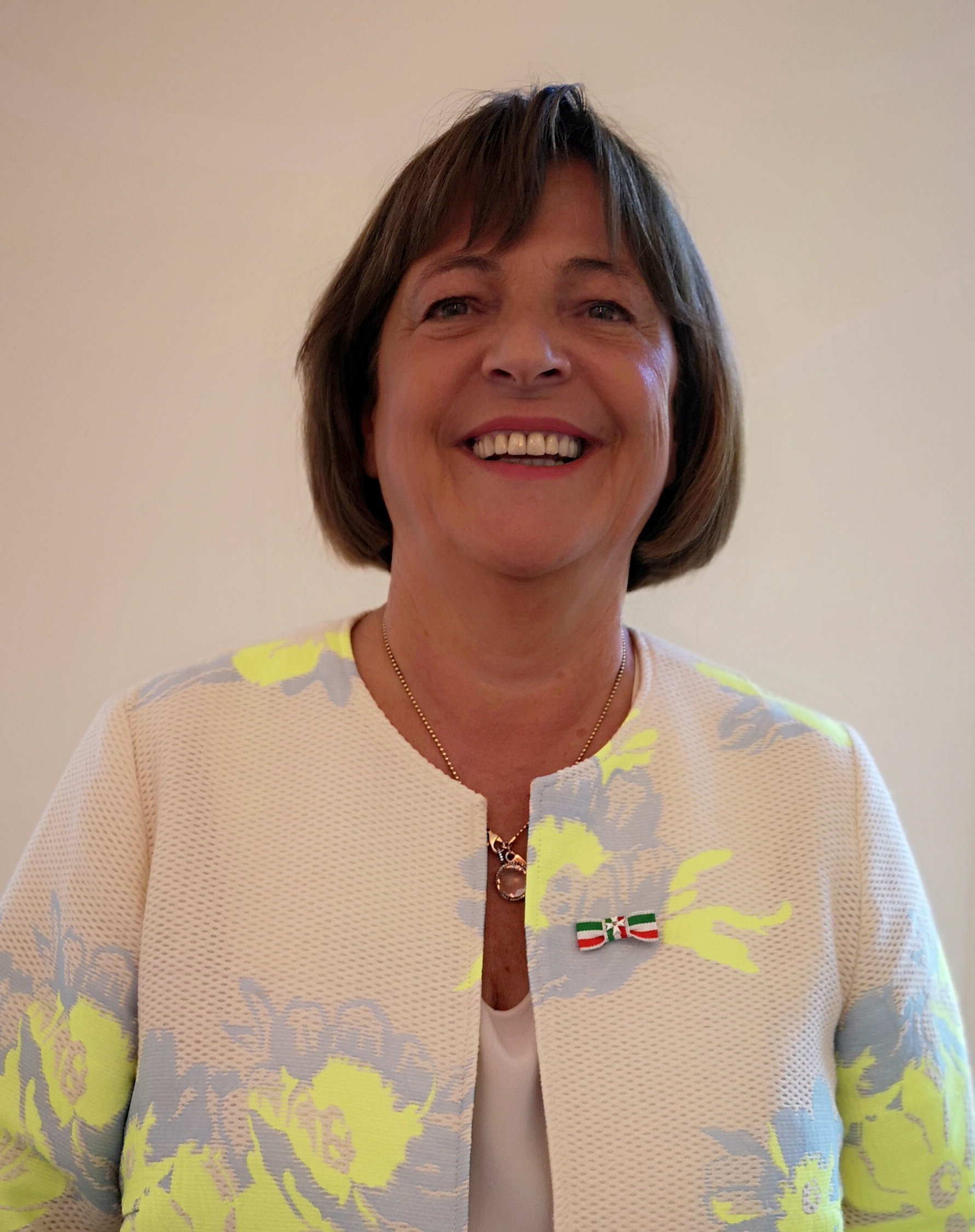 Ulla Schmidt (2018), Verleihung des Verdienstordens des Landes Nordrhein-Westfalen 2018